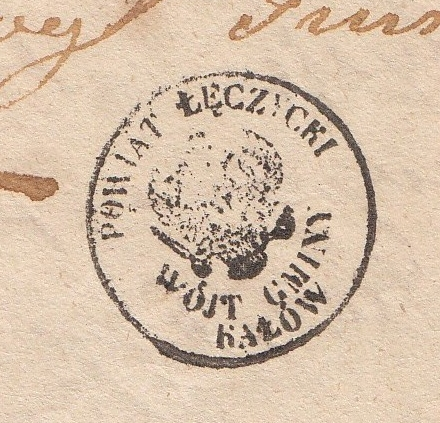 Pieczątka Wójta Gminy Kałów na akcie notarialnym z 1831r.